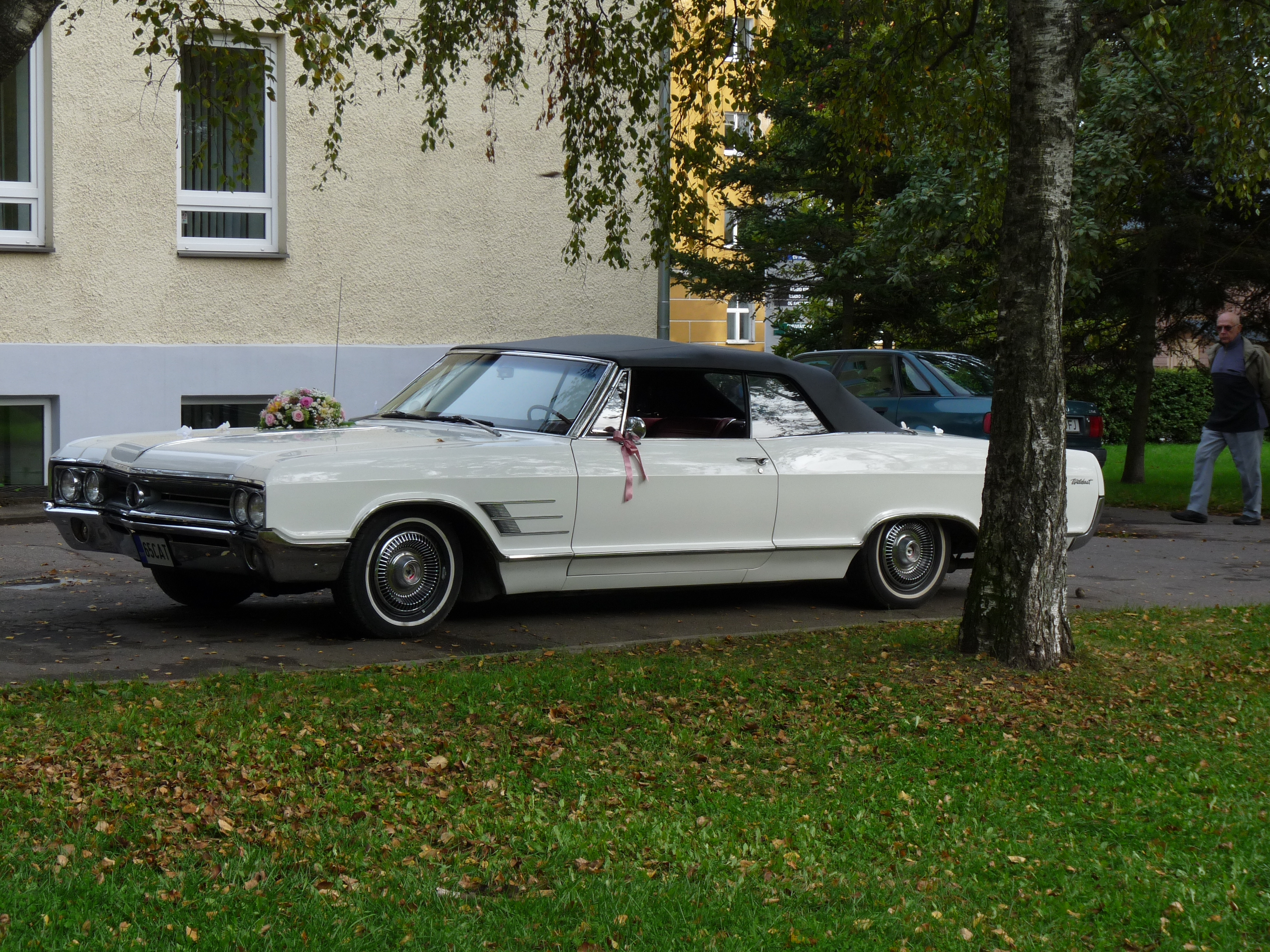 Pulmaauto Tartus õnnepalee ees, 22. september 2012